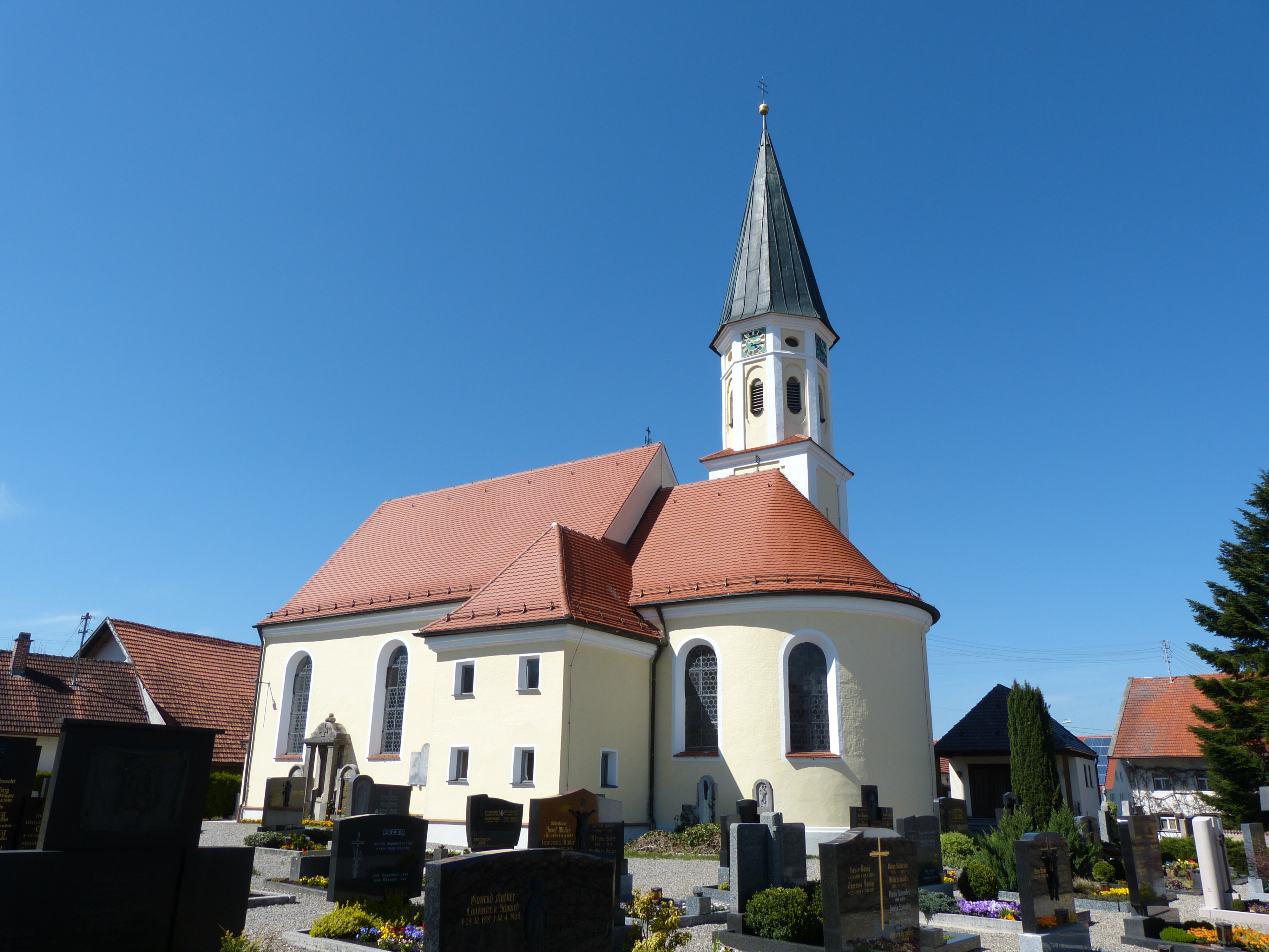 St. Ulrich in Erisried, Landkreis Unterallgäu, Bayern